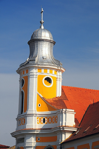 Catedrala Schimbarea la Fata, Cluj-Napoca